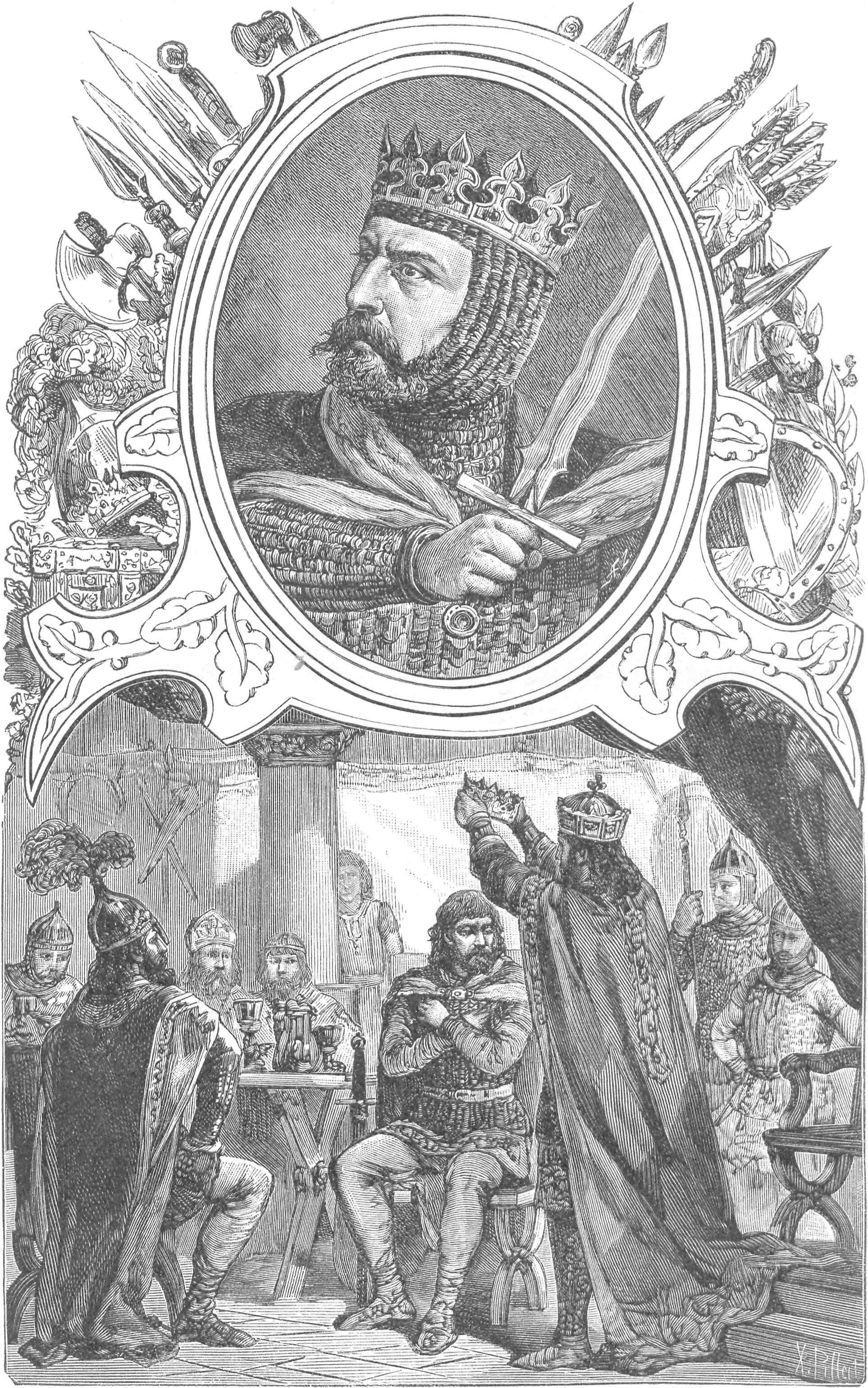 ilustracja z książki „Wizerunki książąt i królów polskich“